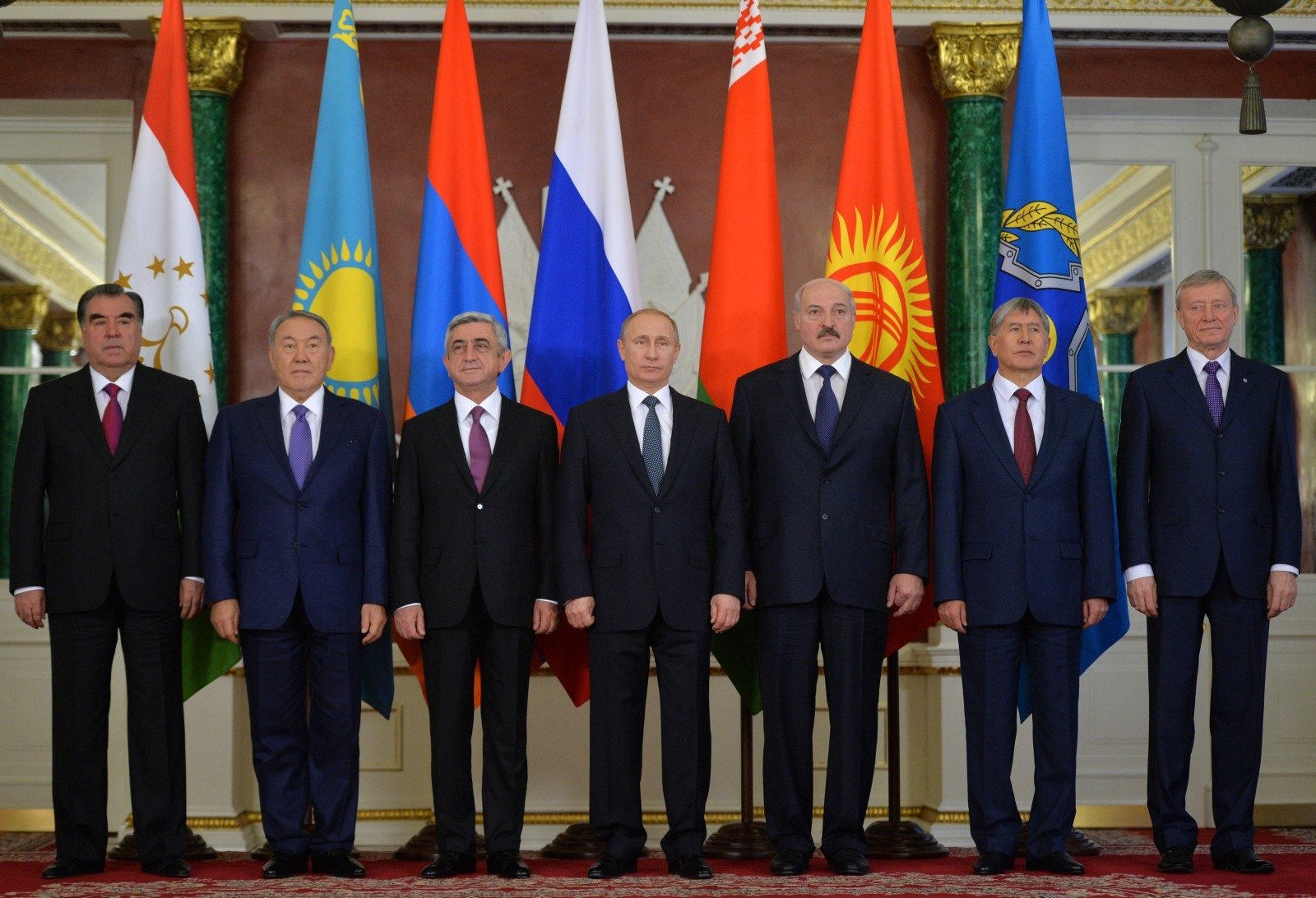 Участники заседания совета коллективной безопасности ОДКБ: Президент Таджикистана Эмомали Рахмон, Президент Казахстана Нурсултан Назарбаев, Президент Армении Серж Саргсян, Президент России Владимир Путин, Президент Белоруссии Александр Лукашенко, Президент Киргизии Алмазбек Атамбаев, Генеральный секретарь ОДКБ Николай Бордюжа. Москва, 23 декабря 2014 года